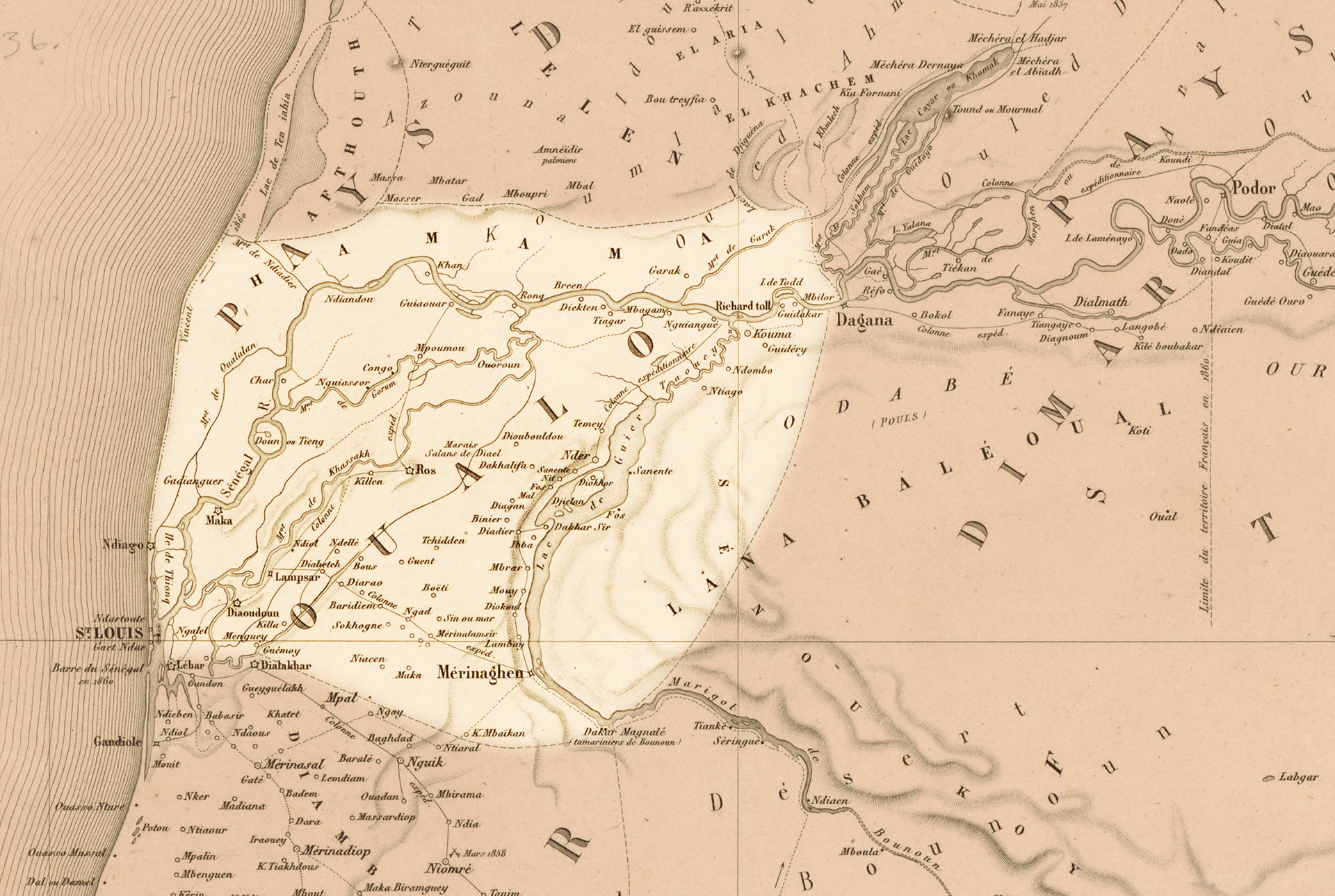 Détail de la carte de Brossard de Corbigny de 1860, mise en évidence du royaume du Waalo - fichier source Commons